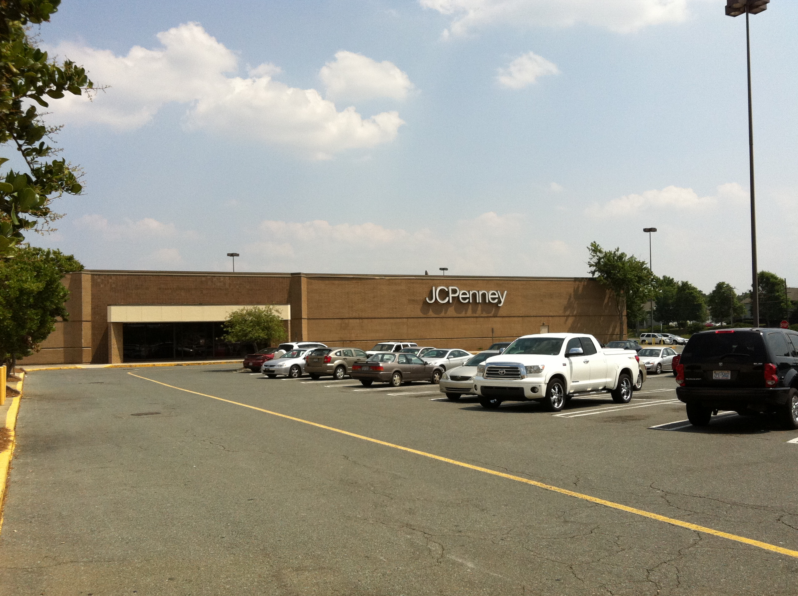 JCPenney